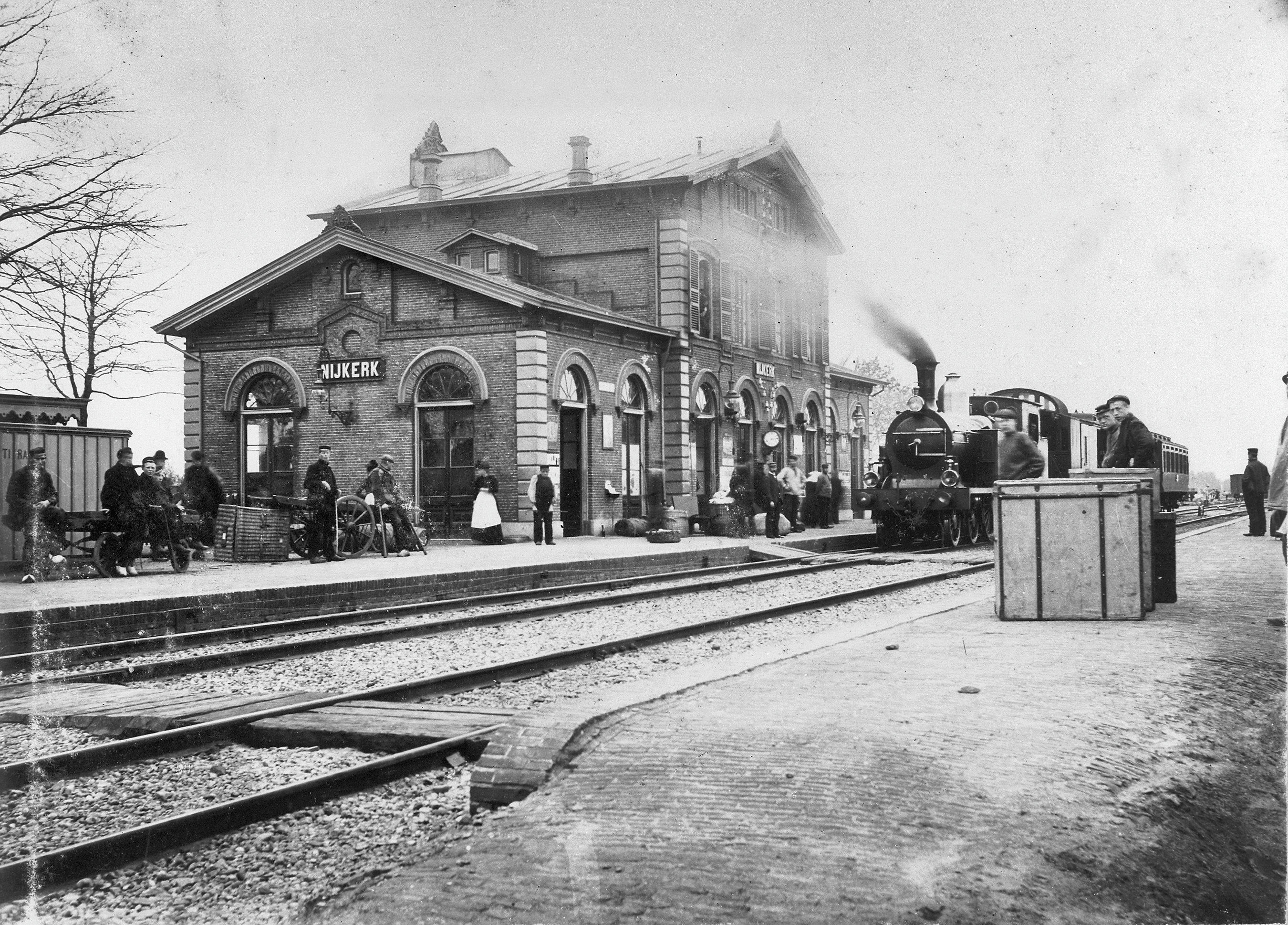 Station, overzicht, reproductie van prentbriefkaart (opmerking: Reproductie van prentbriefkaart (reproductie vervaardigd: 1969, RDMZ, fotograaf Rozema))